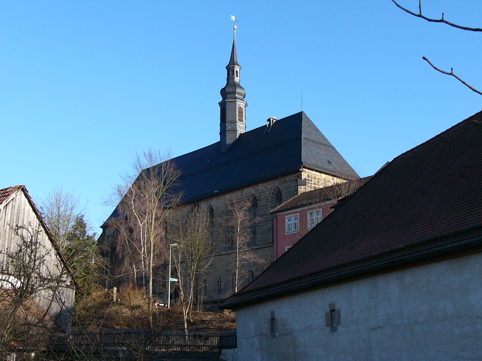 Außenansicht des Klosters